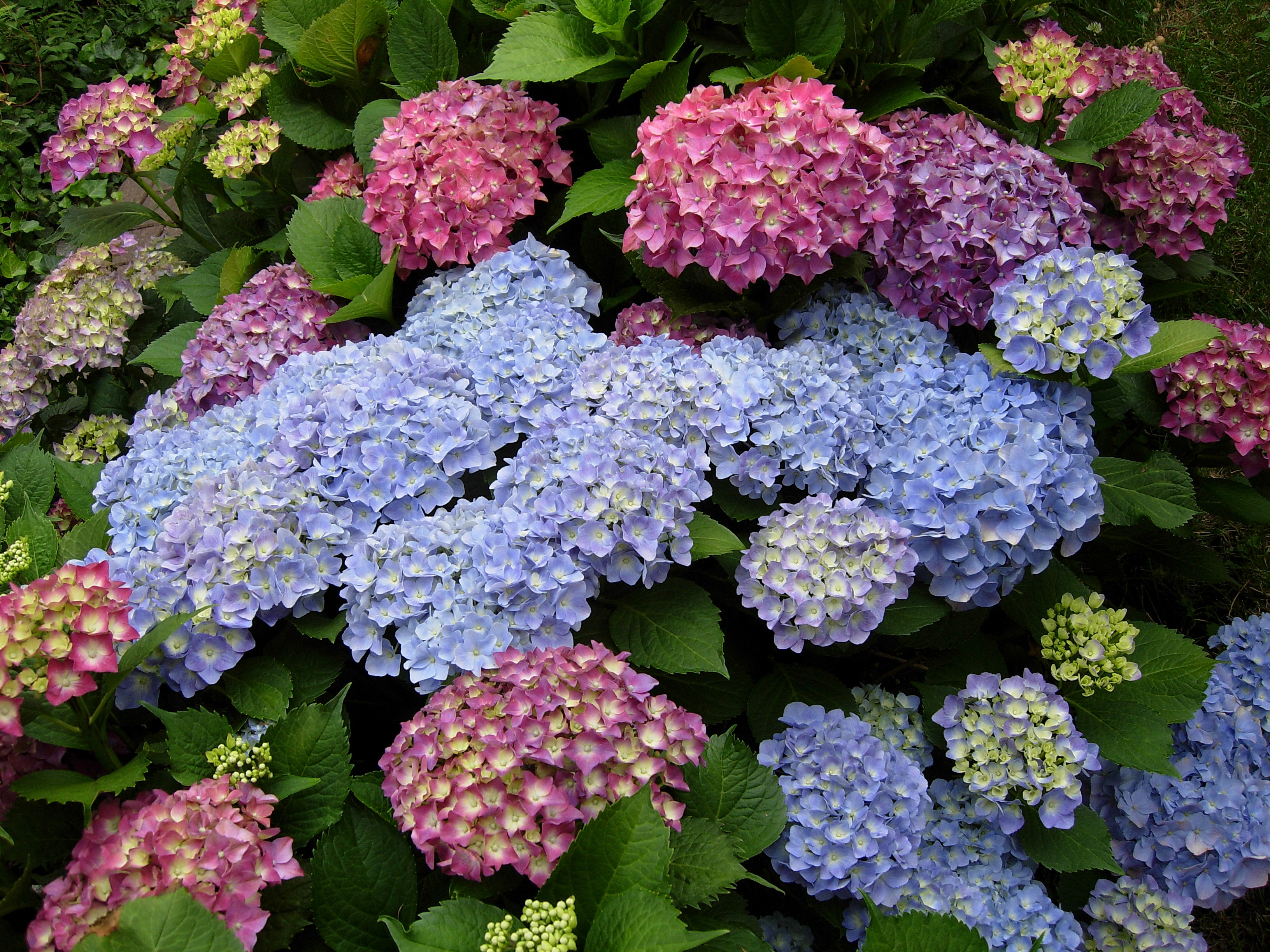 Kwitnące hortensje (Hydrangea)